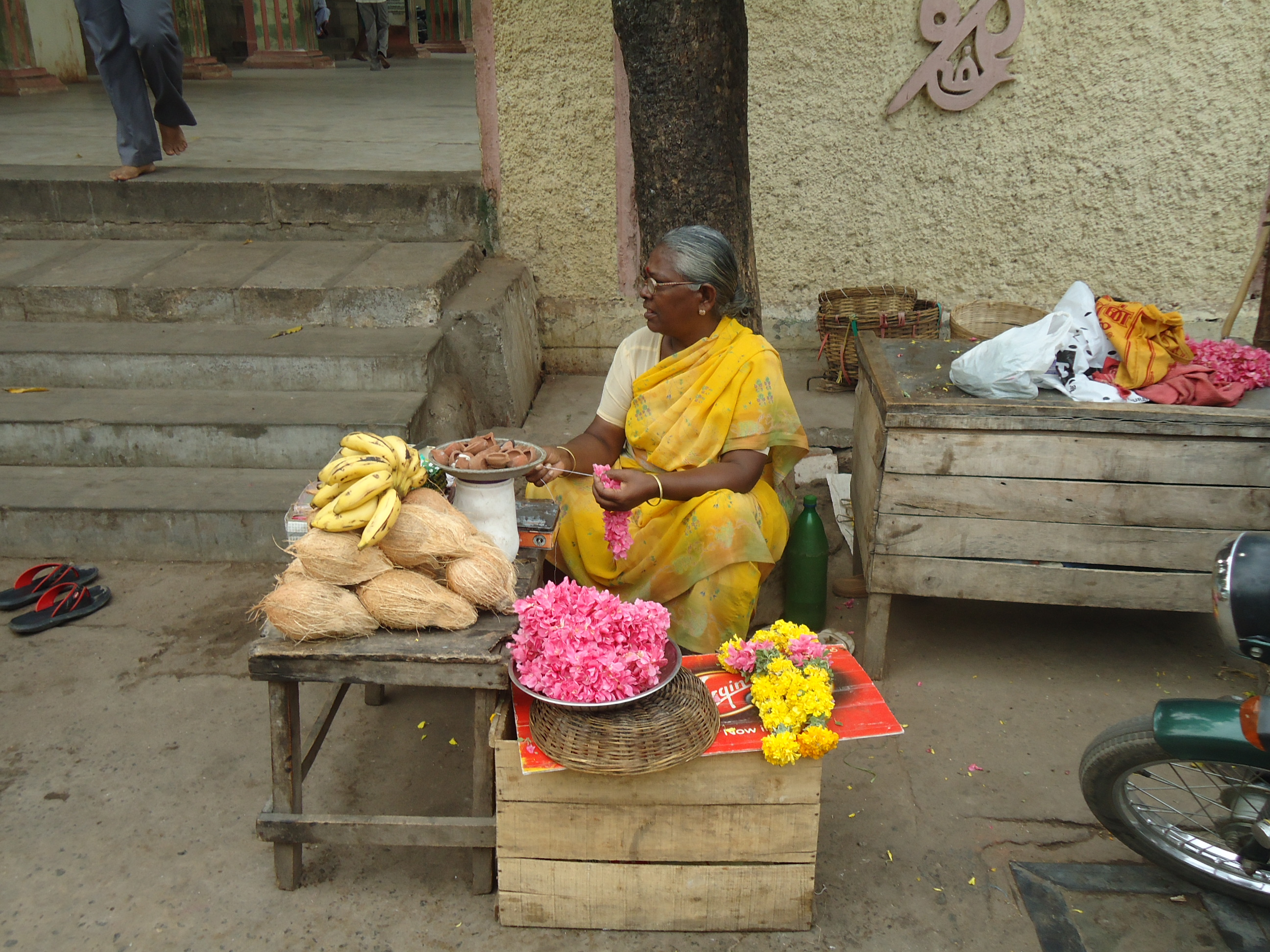 Palani Flower Seller